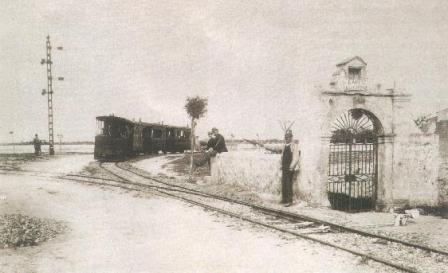 Diramazione per Torre Faro